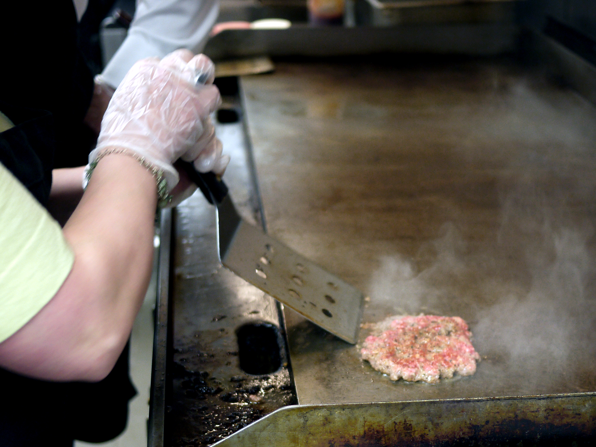 Smashburger